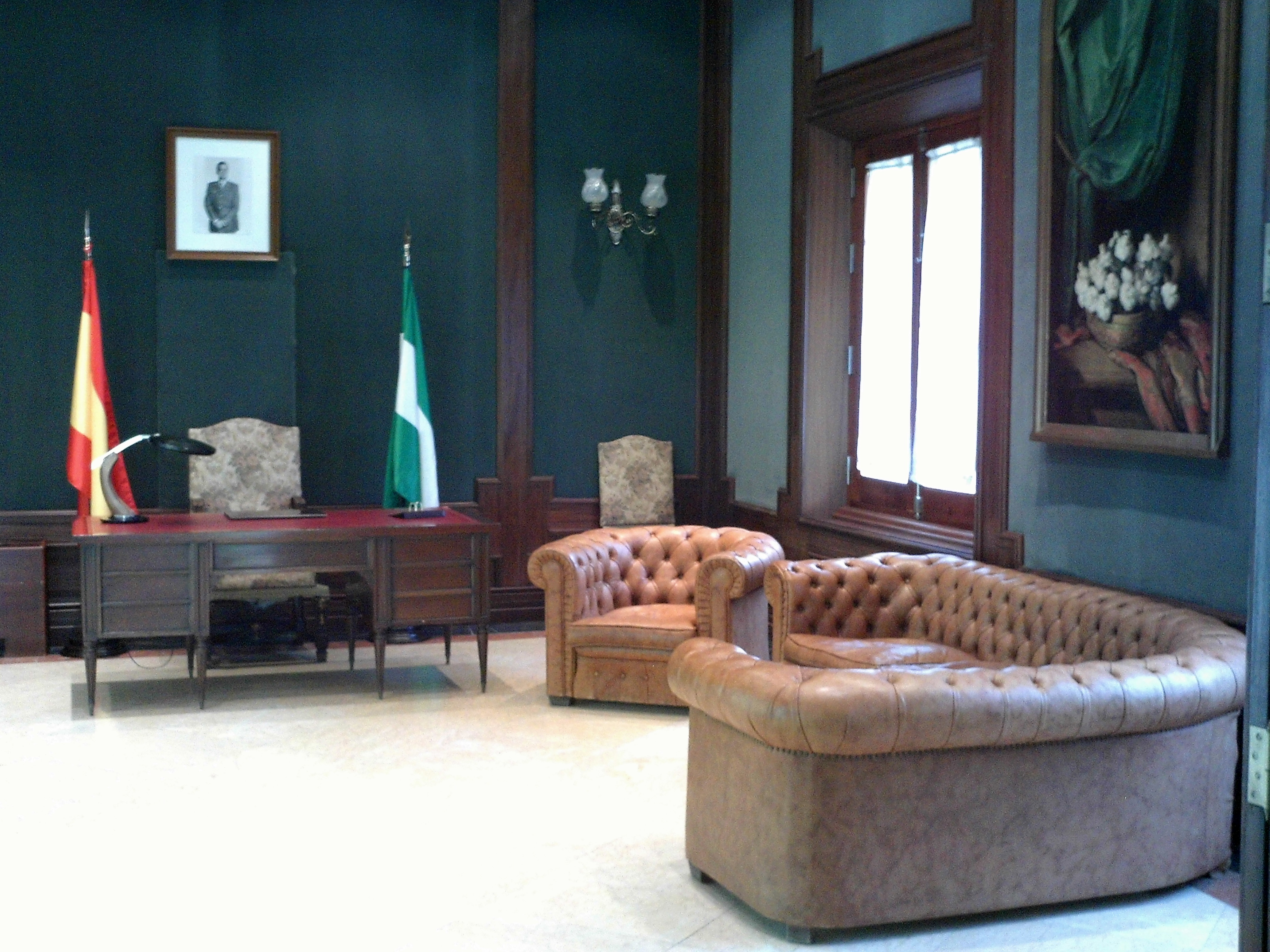 Despacho de Plácido Fernández Viagas de 1978. Primer presidente de la Junta de Andalucía. Casa de la Provincia. Sevilla, Andalucía, España.